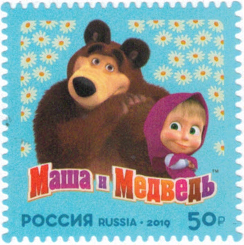 № 2557-2559. Современный российский кинематограф. Мультфильм «Маша и Медведь»